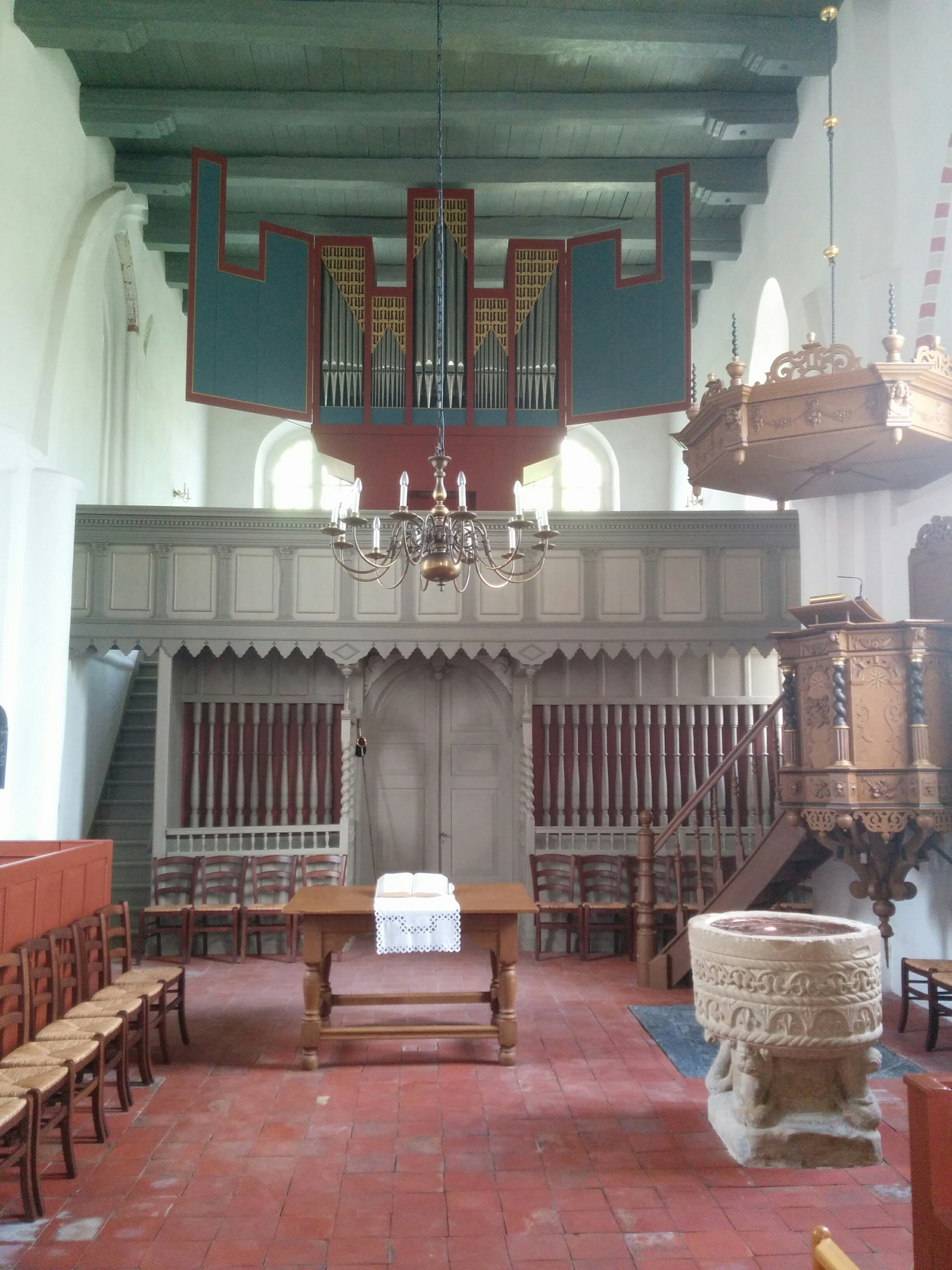 Kirche in Hatzum, Ostfriesland